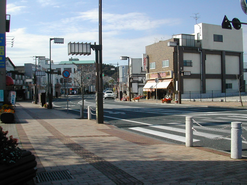 Takahagiteisyajyo,ibaraki,Japan